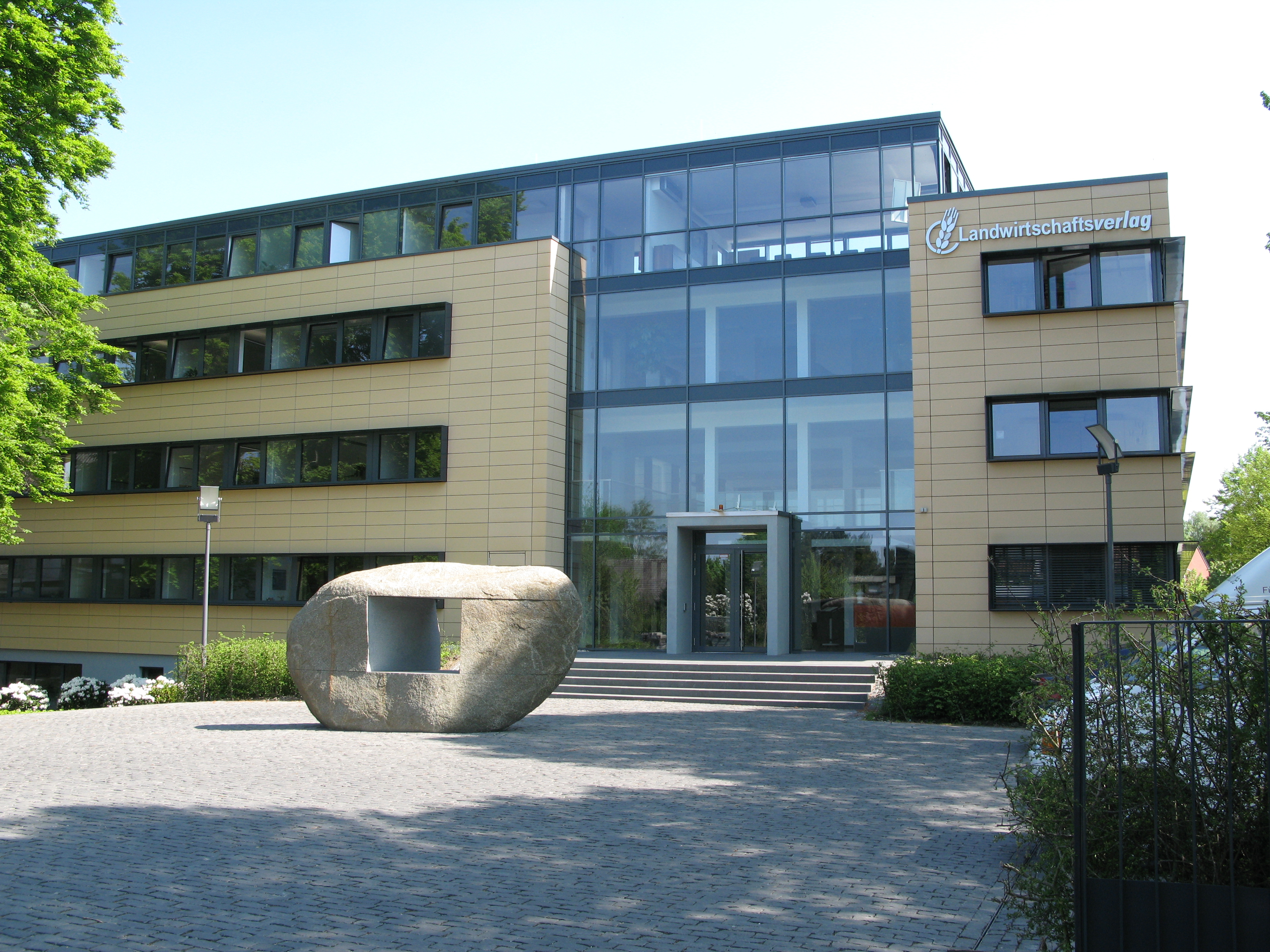 Landwirtschaftsverlag Münster, Hülsebrockstr. 2-8, 48165 Münster. Sitz der Redaktionen Landlust, profi - Das Magazin für professionelle Agrartechnik, Landwirtschaftliches Wochenblatt Westfalen-Lippe und top agrar - Das Magazin für moderne Landwirtschaft.